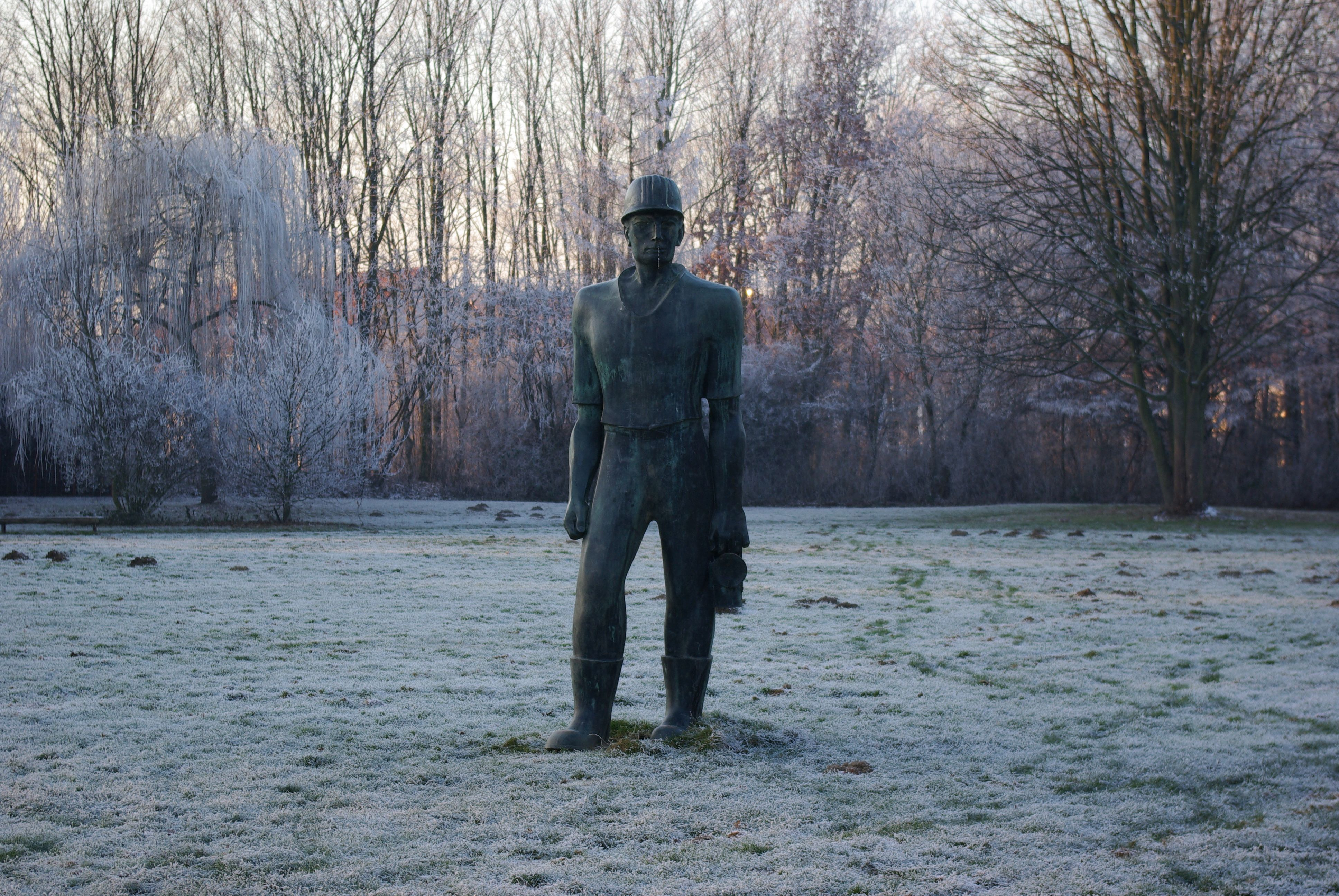 Lengede, Niedersachsen, eine bronzene Figur im Seilbahnpark